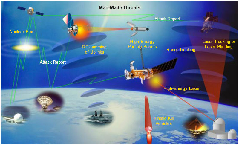 Mögliche Bedrohungen von Objekten im Weltraum